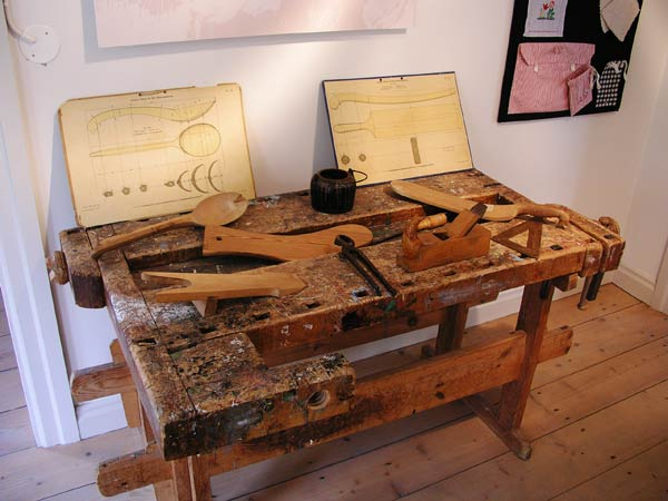 Slöjdbänk i skolmuseet, Gamla Linköping. Foto: Xauxa 2003